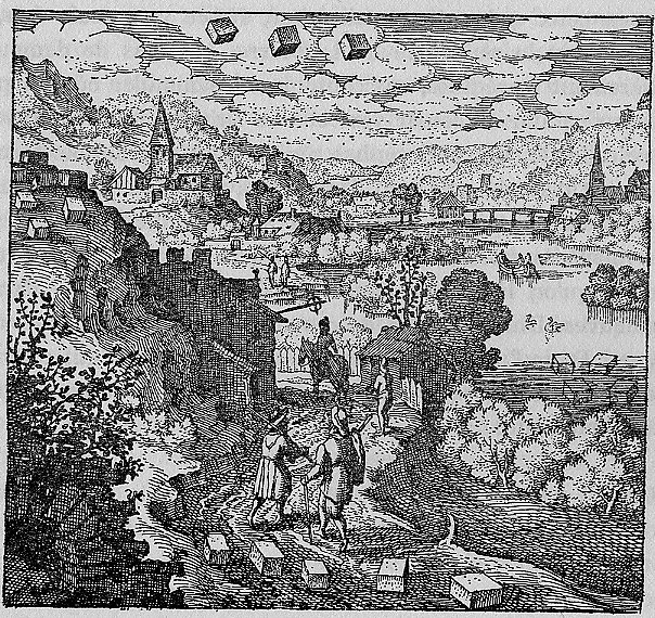 Emblem 36